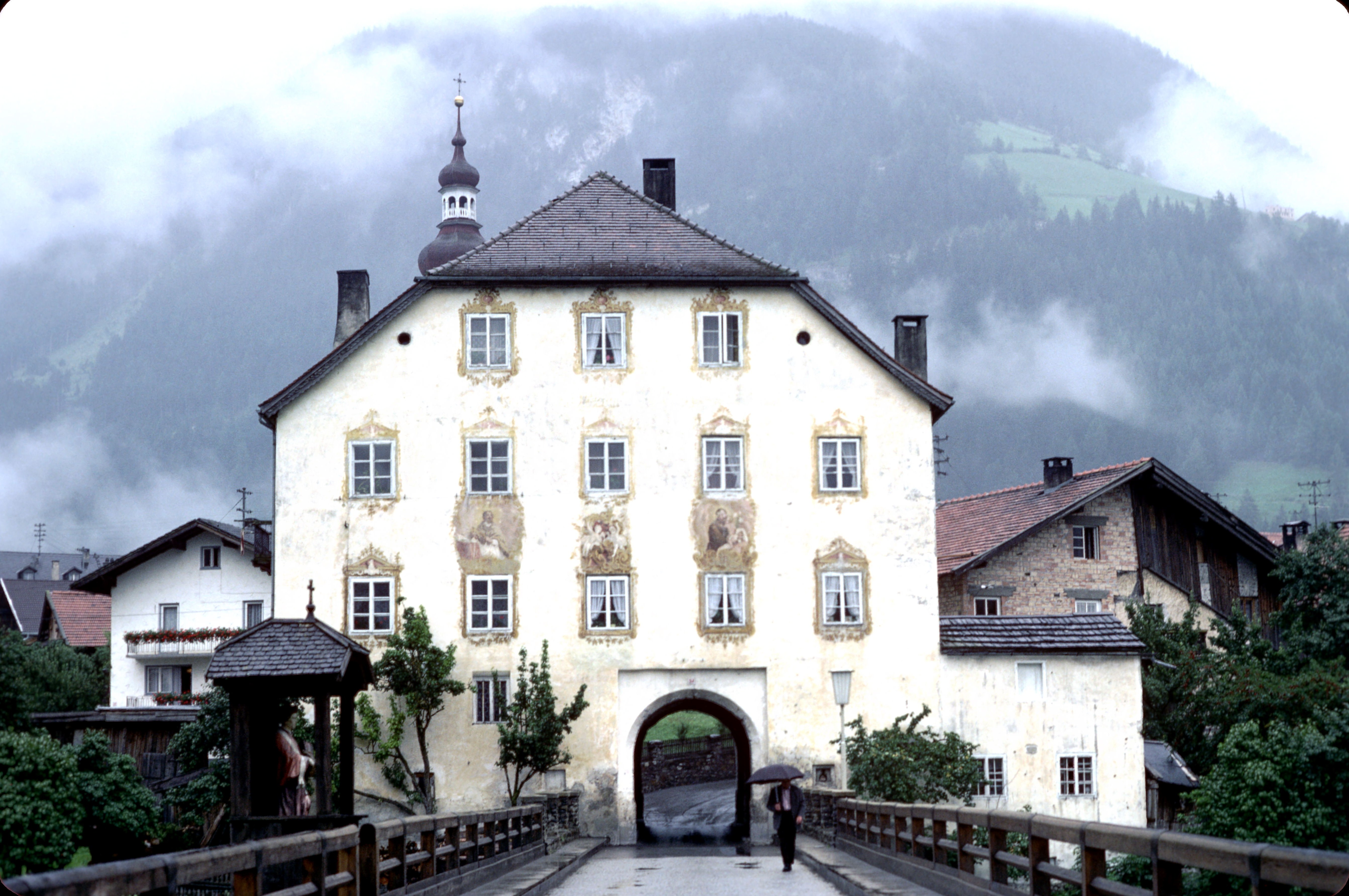 Le Pont de l' Inn et la tour-maison du village de Pfunds en Autriche. Cette tour-maison qui est habitée servait de fortification et permettait le contrôle de l' entrée du village. Sur le pont qui franchit la rivière Inn, on peut apercevoir, à gauche, une chapelle. Cette photographie a été prise un matin de ciel gris et pluvieux. Pfunds est un village autrichien situé sur la rivière Inn dans la partie sud-ouest du Tirol et près de la ville de Landeck. Pfunds, Tirol, Autriche.